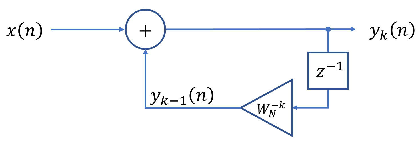 格策爾一階系統示意圖